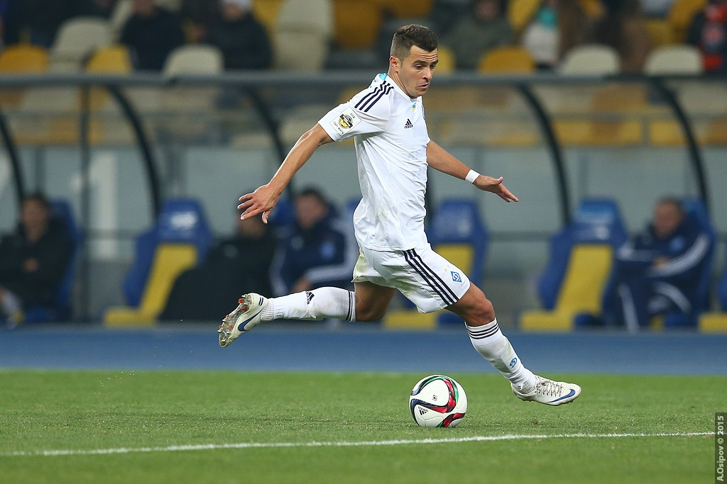 16.10.2015 г.Киев. НСК "Олимпийский". 11-й тур Лиги Пари-Матч. Динамо Киев - Шахтер Донецк - 0:3